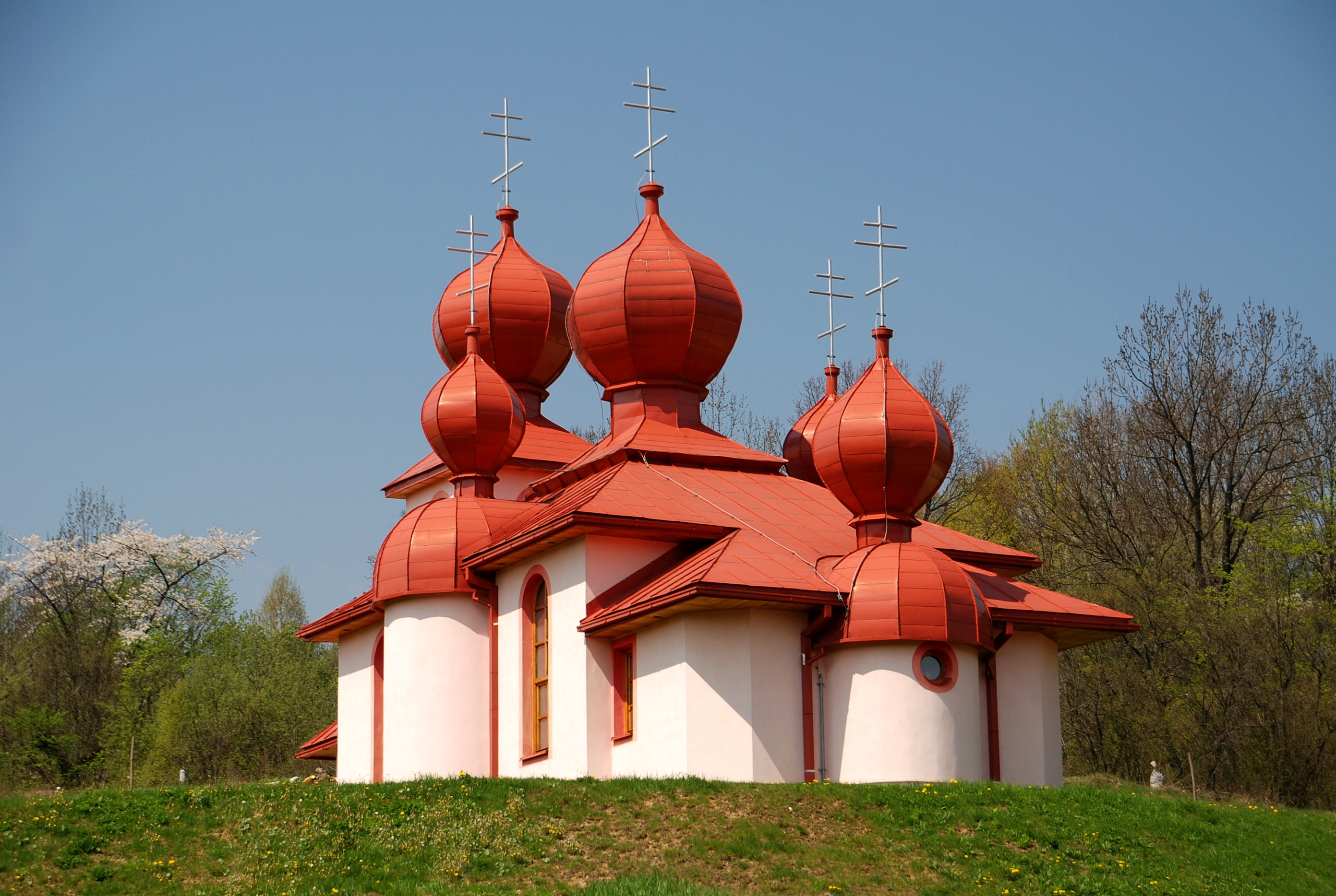 cerkiew